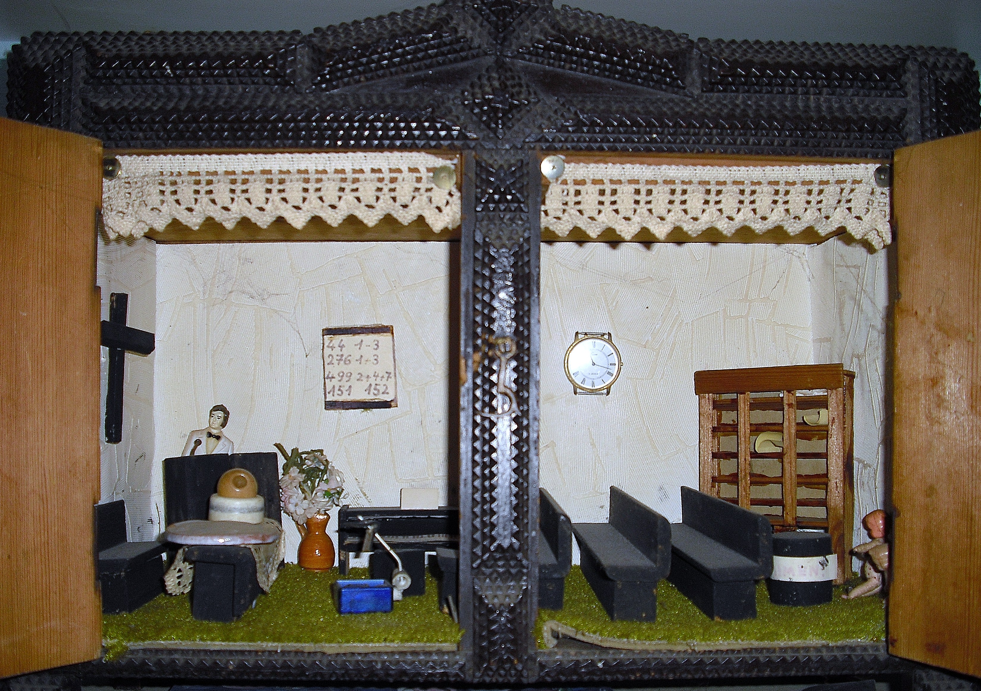 Inneres einer einfachen Baptistenkirche als Puppenhaus. In der linken Bildhäfte Abendmahlstisch und Kanzel; vorne ein Overheadprojektor. In der rechten Bildhälfte ein typischer Einrichtungsgegenstand von Baptistenkirchen: die sogenannten "Postfächer". Jedes Gemeindemitglied verfügt hier in der Regel über ein eigenes Postfach.